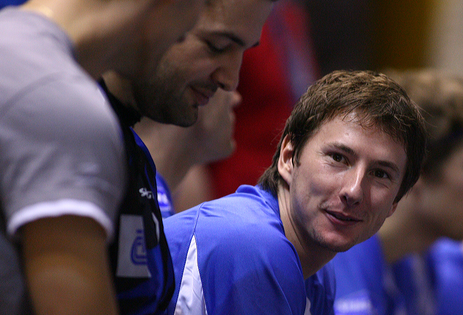 WFC 2008